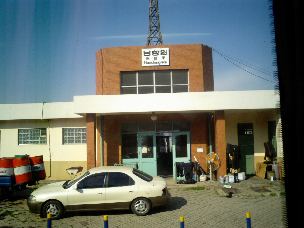 진해선 남창원역